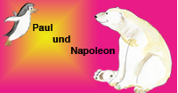 Paul und Napoleon, Logo